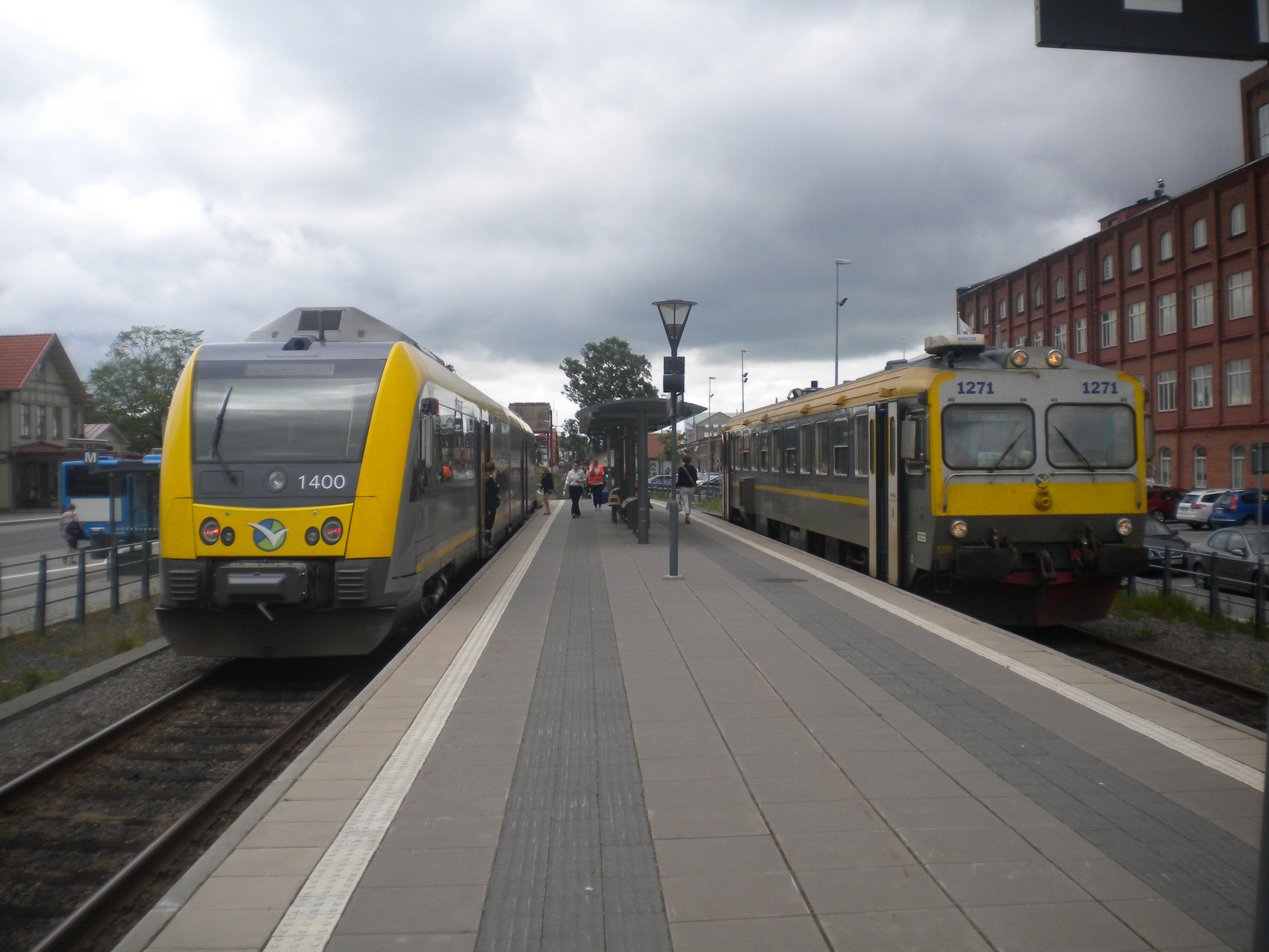 Två rälsbussar i Lidköping 2013: T.v. Västtrafik Y31 1400 som tåg 3361 mot Herrljunga. T.h. Västtrafik Y1 1271 som tåg 3324 mot Hallsberg och Örebro.